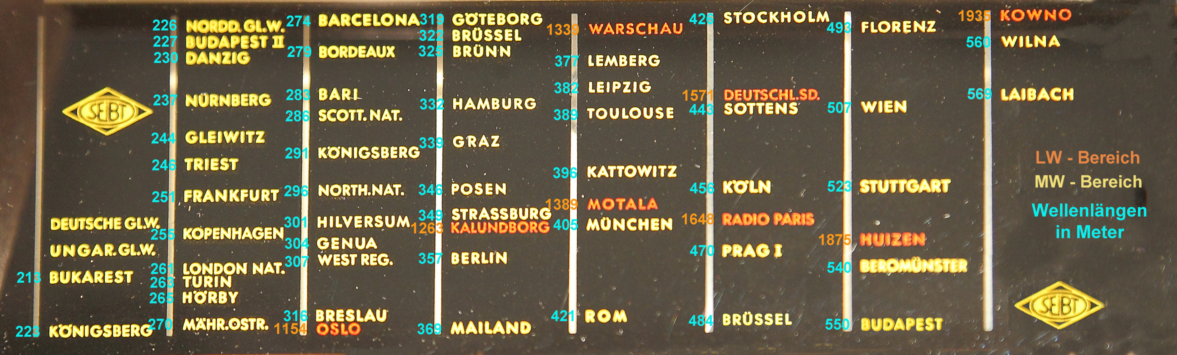 Senderskala von Radioempfänger Seibt 214 W, Bj. 1934 für LW und MW - Wellenlängenskala (in Metern)